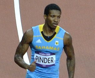 _D704712